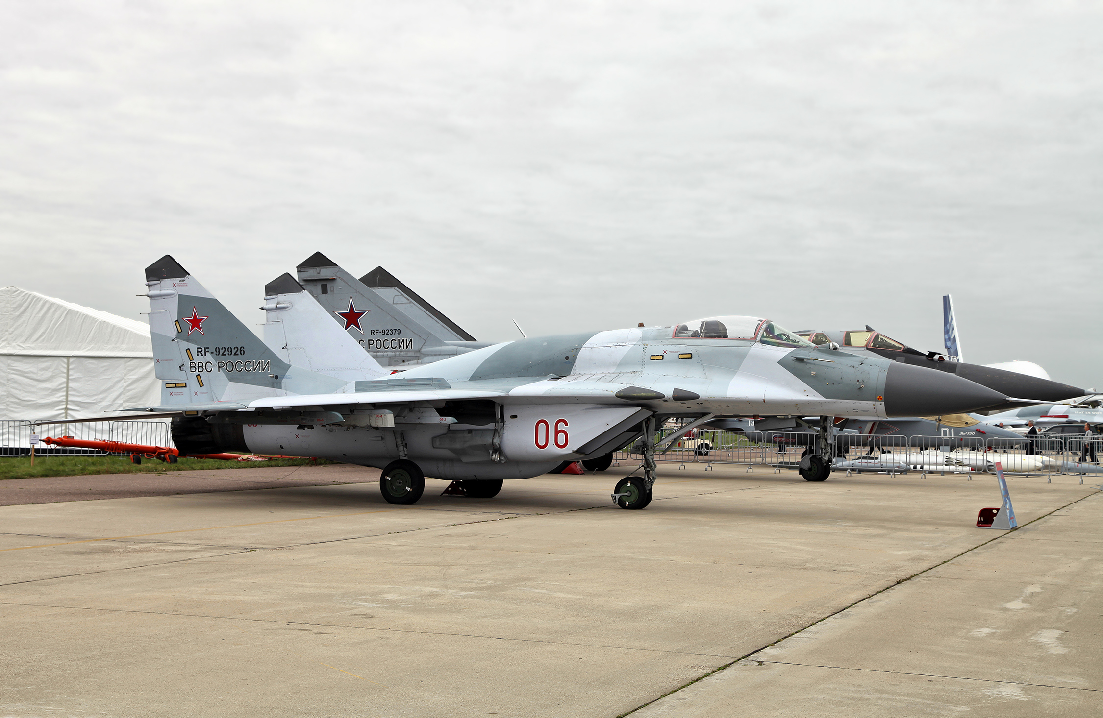 МиГ-29СМТ (MiG-29SMT)